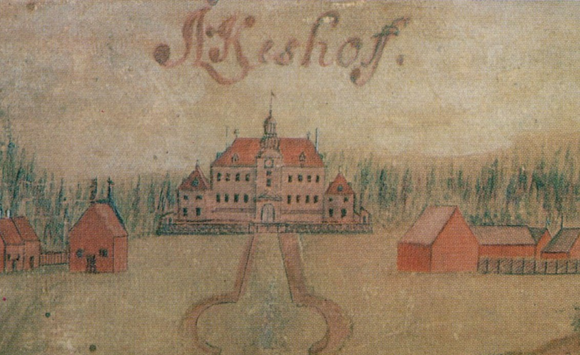 Detalj från Gripenhielms Mälarkarta, Åkeshov